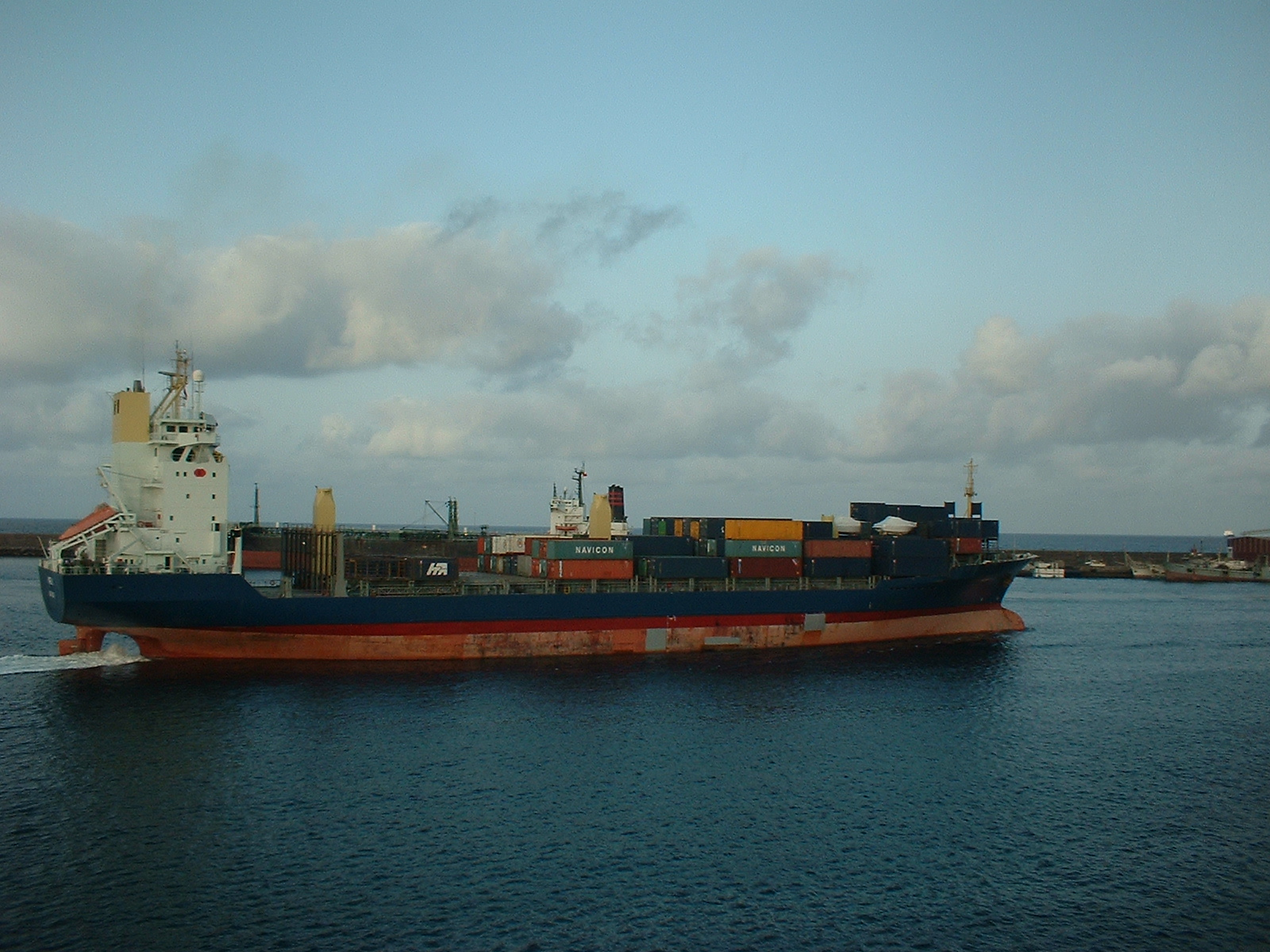 Containerschiff Maren S Typ BV 1600 des Bremer Vulkan